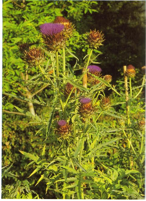 Главице артичоке